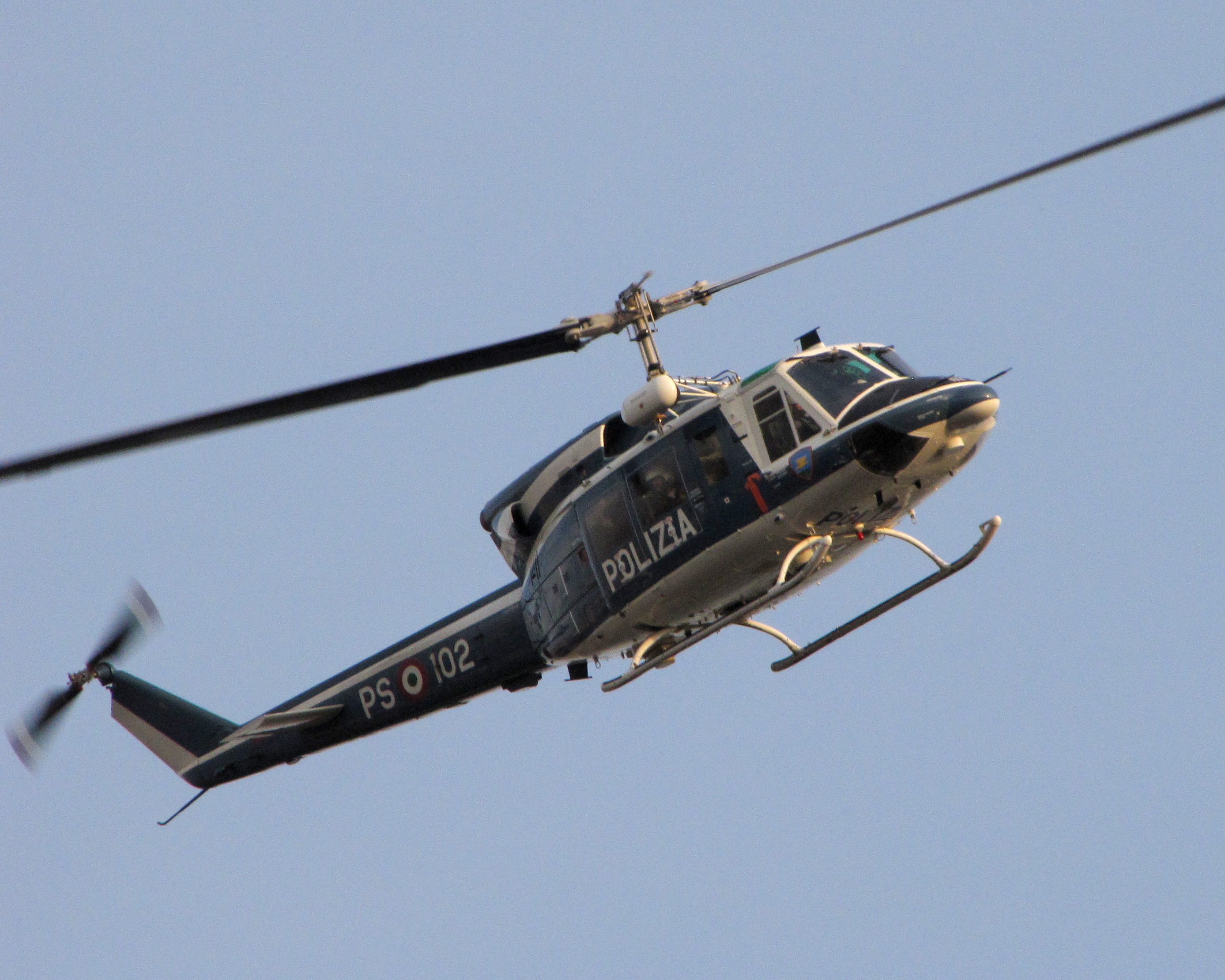 Elicottero AB 212 della Polizia di Stato